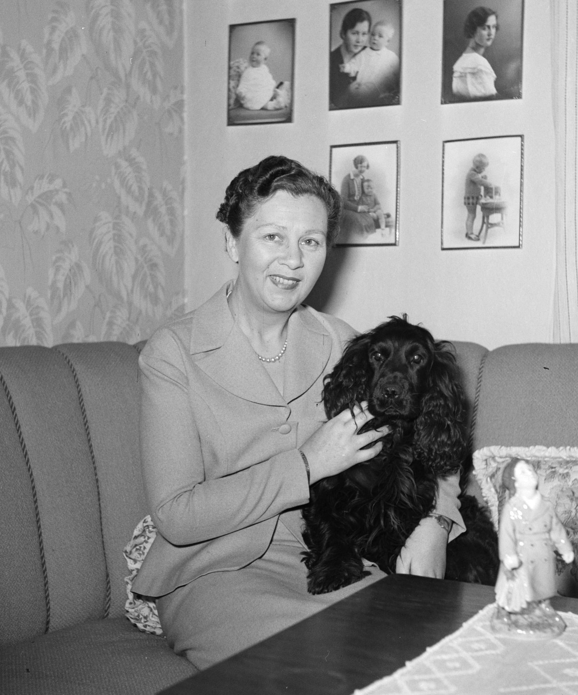 Ella Hedtoft zittend op de bank met een hond